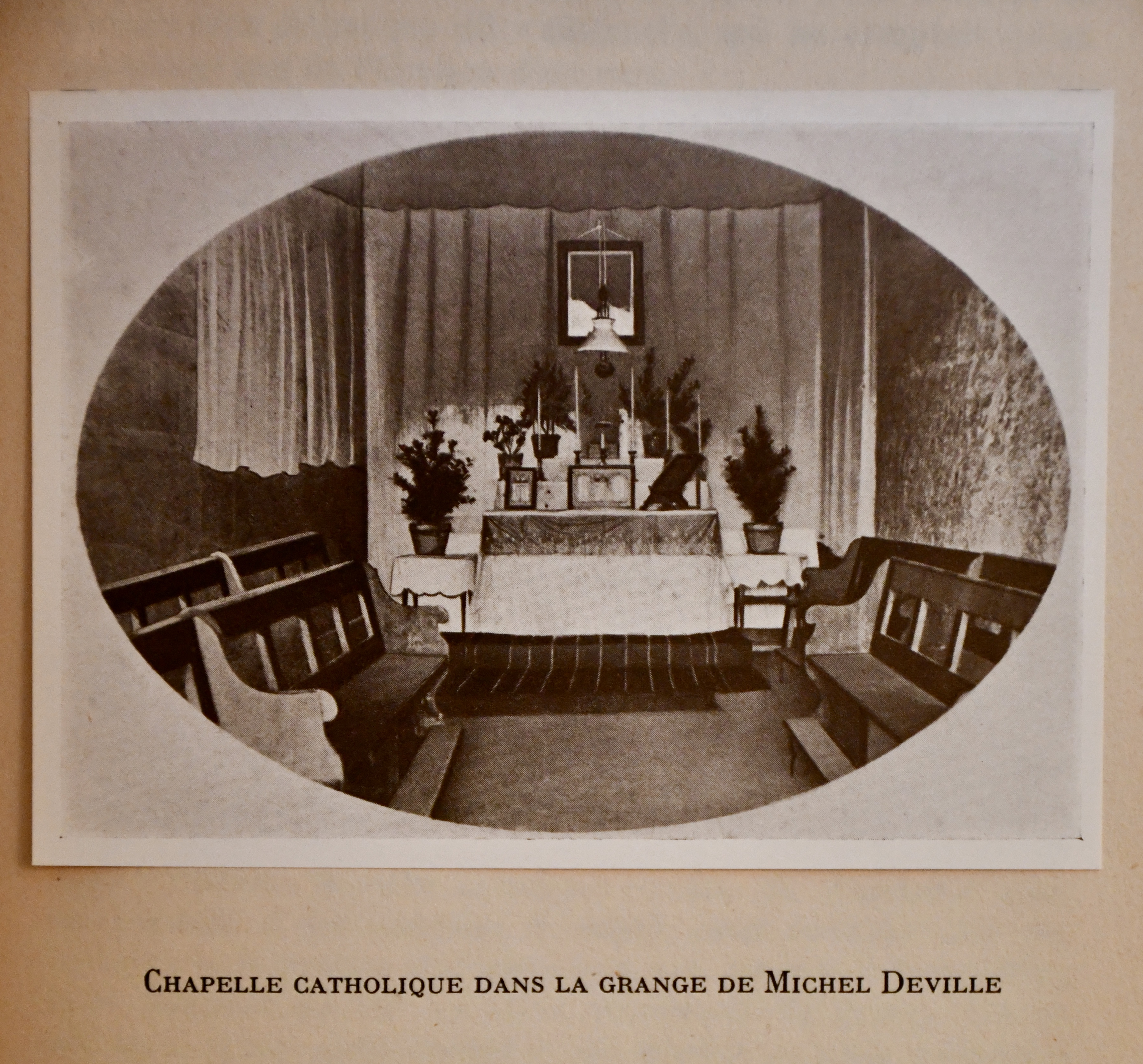 Photographie de l'intérieur de la grange Deville transformée en chapelle catholique lors du Kulturkampf.